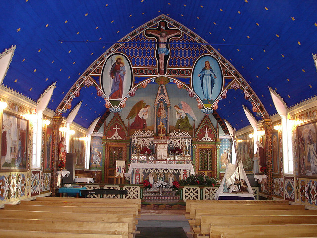 Interrieur de l'église Notre-Dame-de-Bonne-Espérance à Fort Good Hope